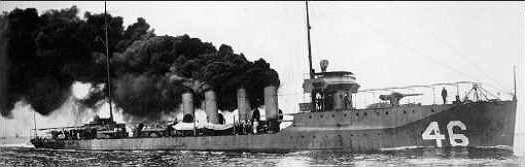 USS "Duncan".